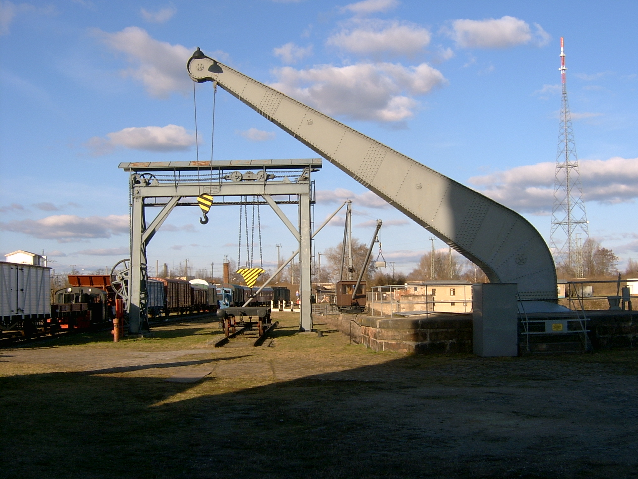 Magdeburger Handelshafen - stationärer Schwerlastdampfkran „Elefant“